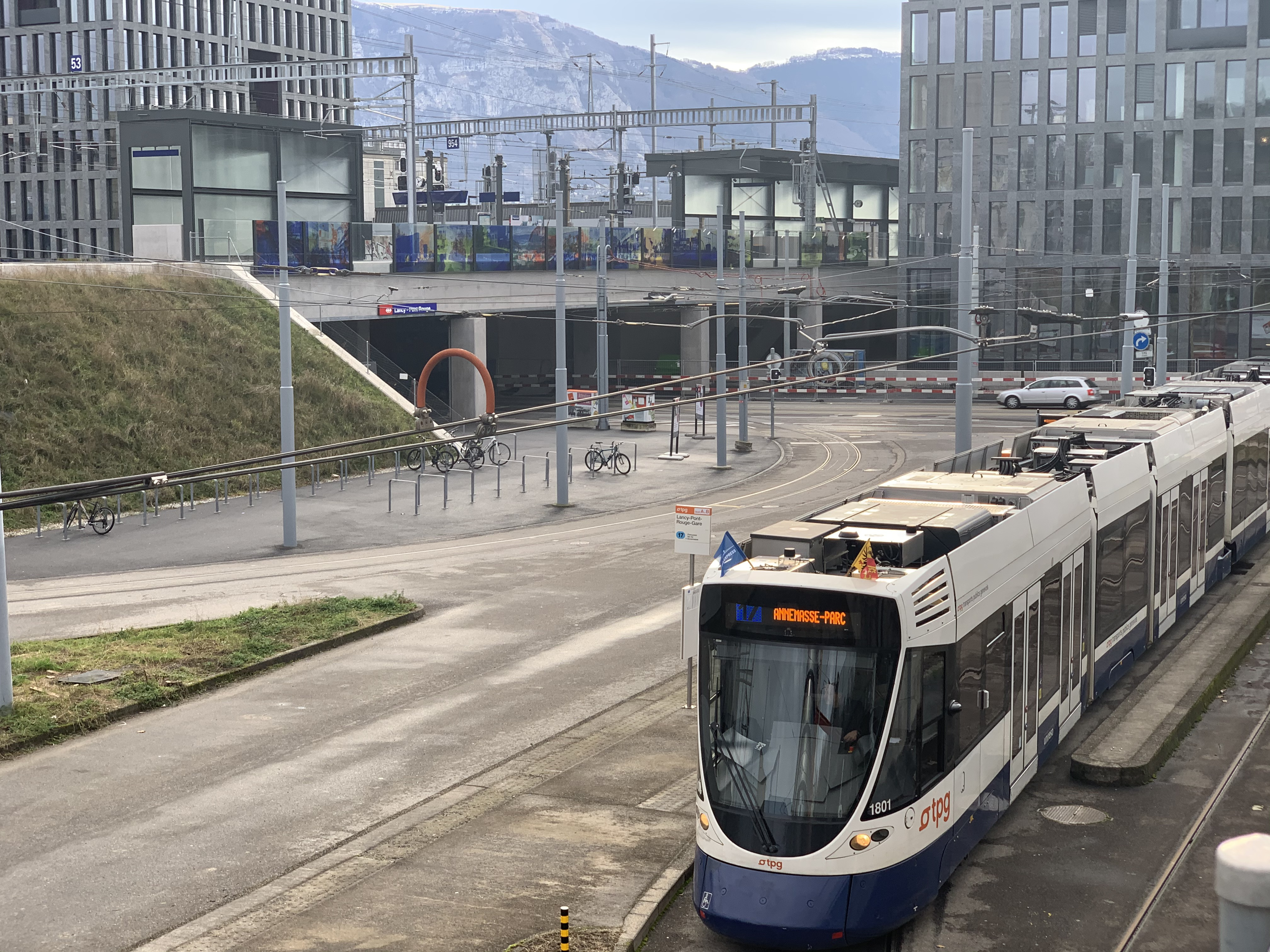 Un tram des TPG au terminus de Lancy-Pont-Rouge-Gare. On voit la gare en question au fond.